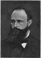 Den norske arkeologen Ingvald Undset.